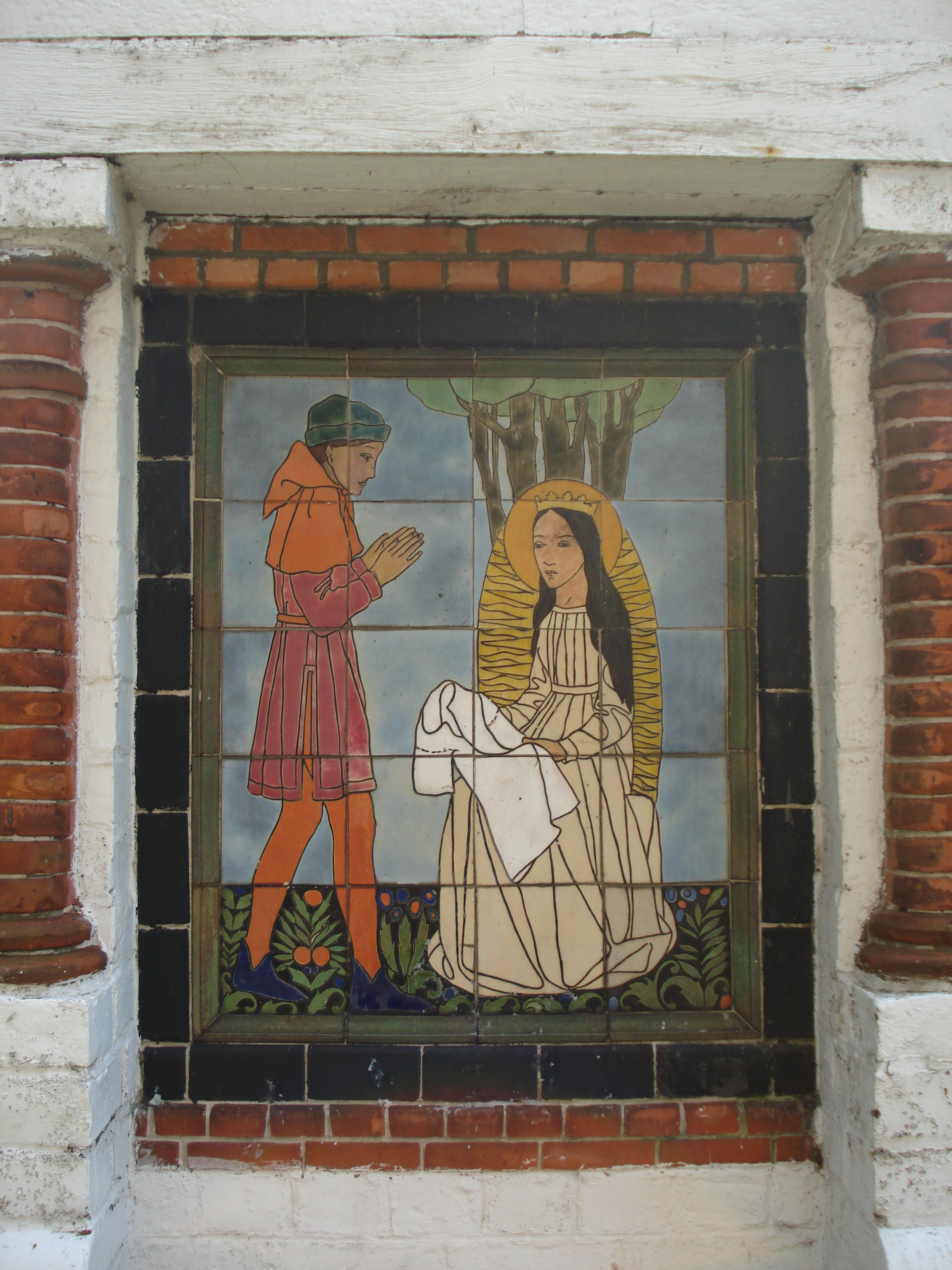 Het wonder van het hemd zonder naad, Onze-Lieve-Vrouw-Tenhemelopnemingskerk_(Gistel)